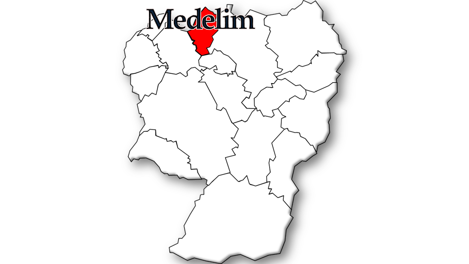 População